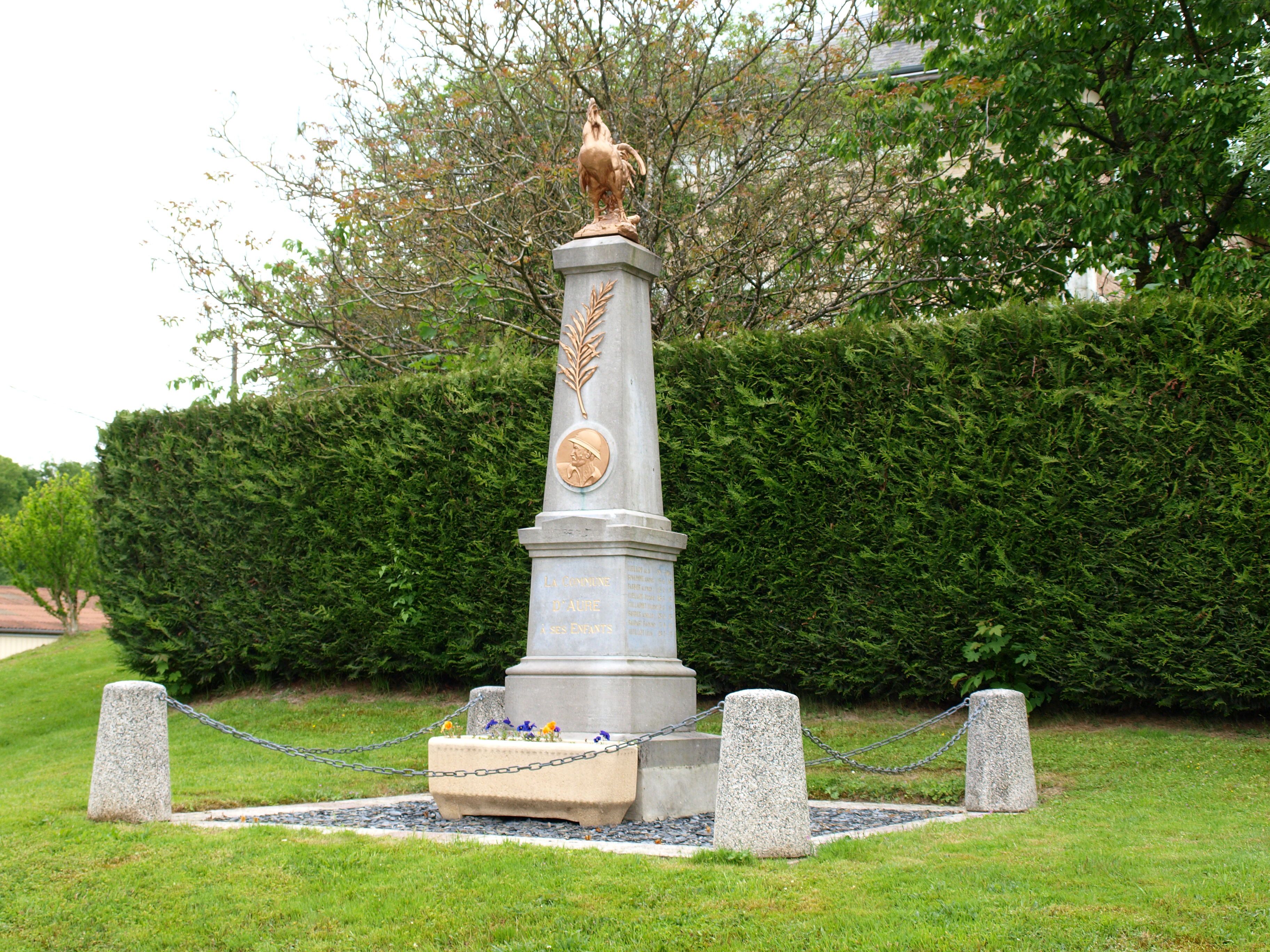 Aure (Ardennes , France) ; monument aux morts